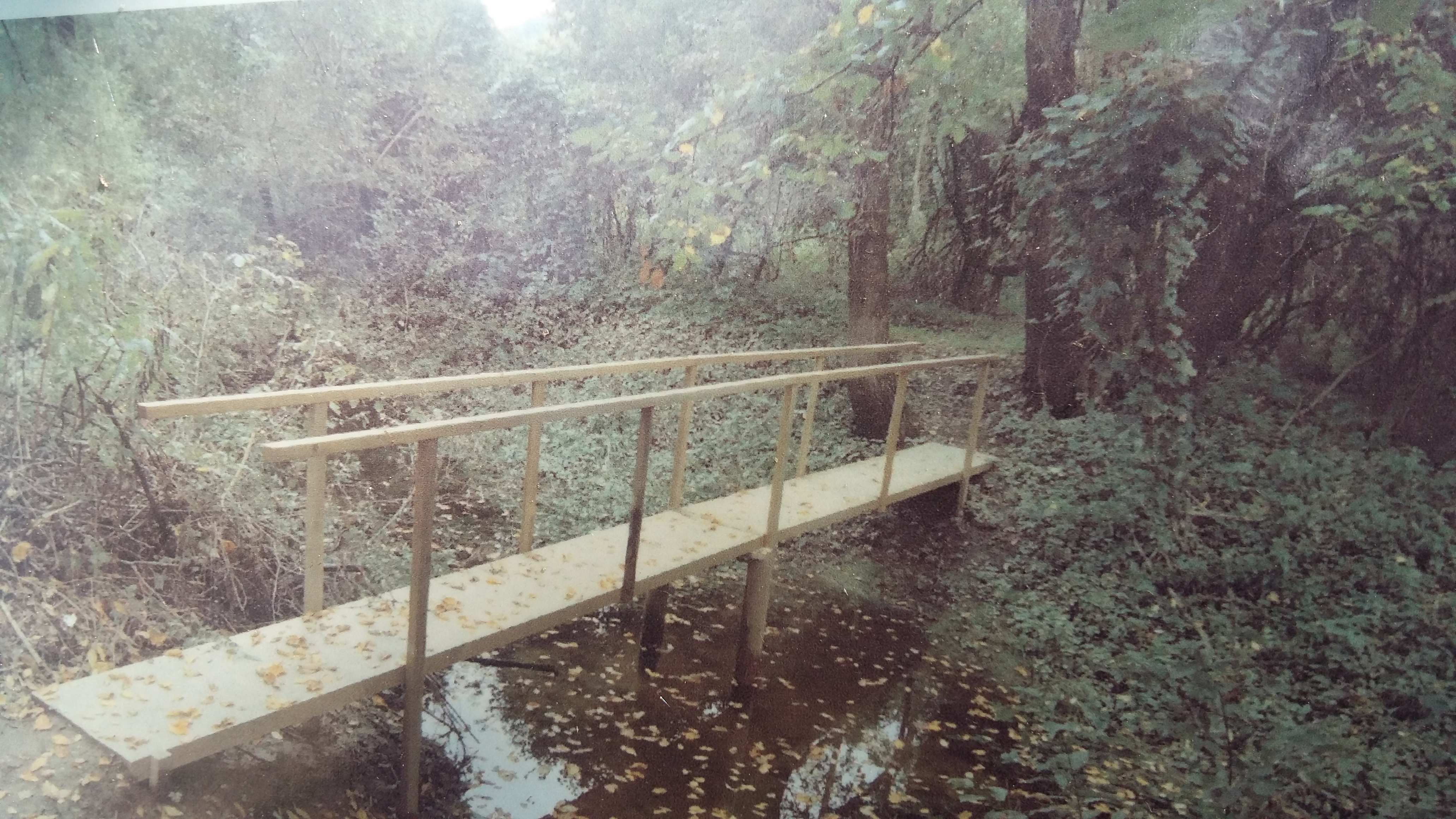 Most